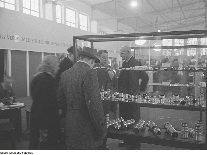 Original image description from the Deutsche Fotothek Messebesucher vor einer Vitrine mit Objektiven der Firma Meyer Optik